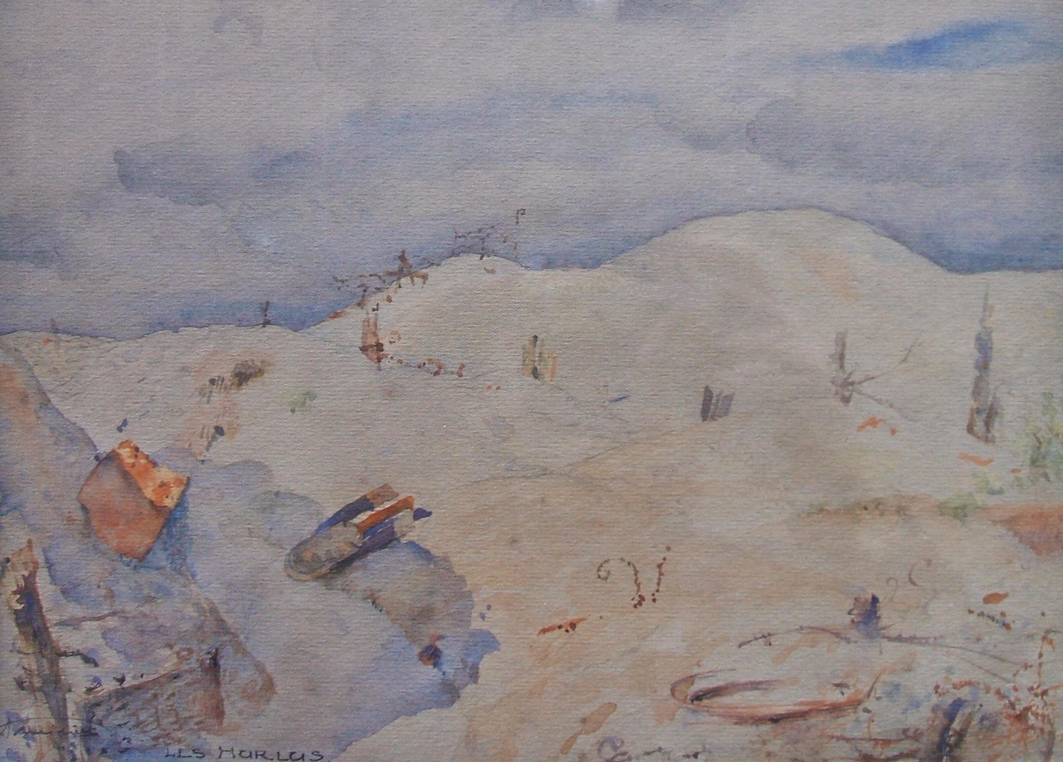 "Les Hurlus", aquarelle d'Alexandre Miniac (1885-1963), alors militaire français. Elle a été réalisée lors de la Première Guerre Mondiale aux Hurlus, une petite commune du département de la Marne, entre Reims et Verdun, anéantie par la guerre et officiellement disparu en 1950.